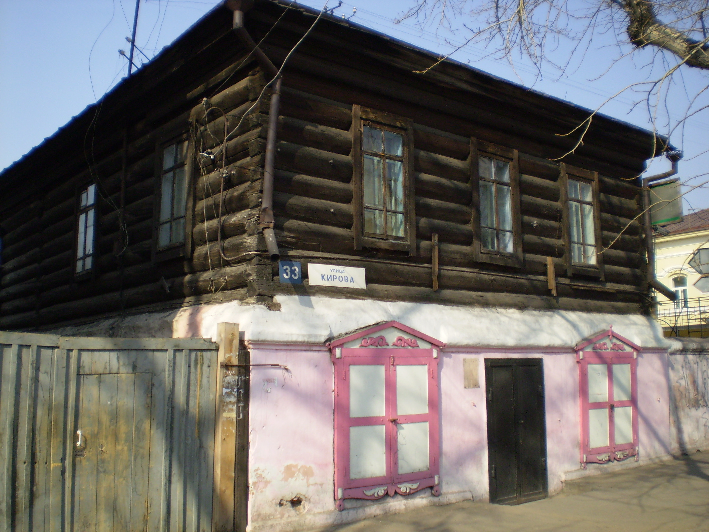 Полукаменный дом